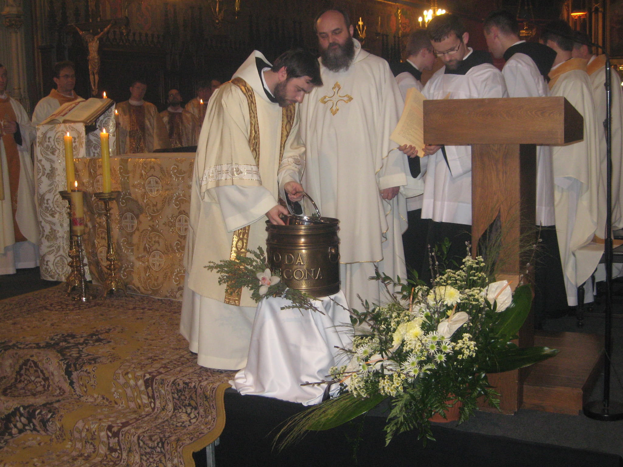 Poswięcenie wody